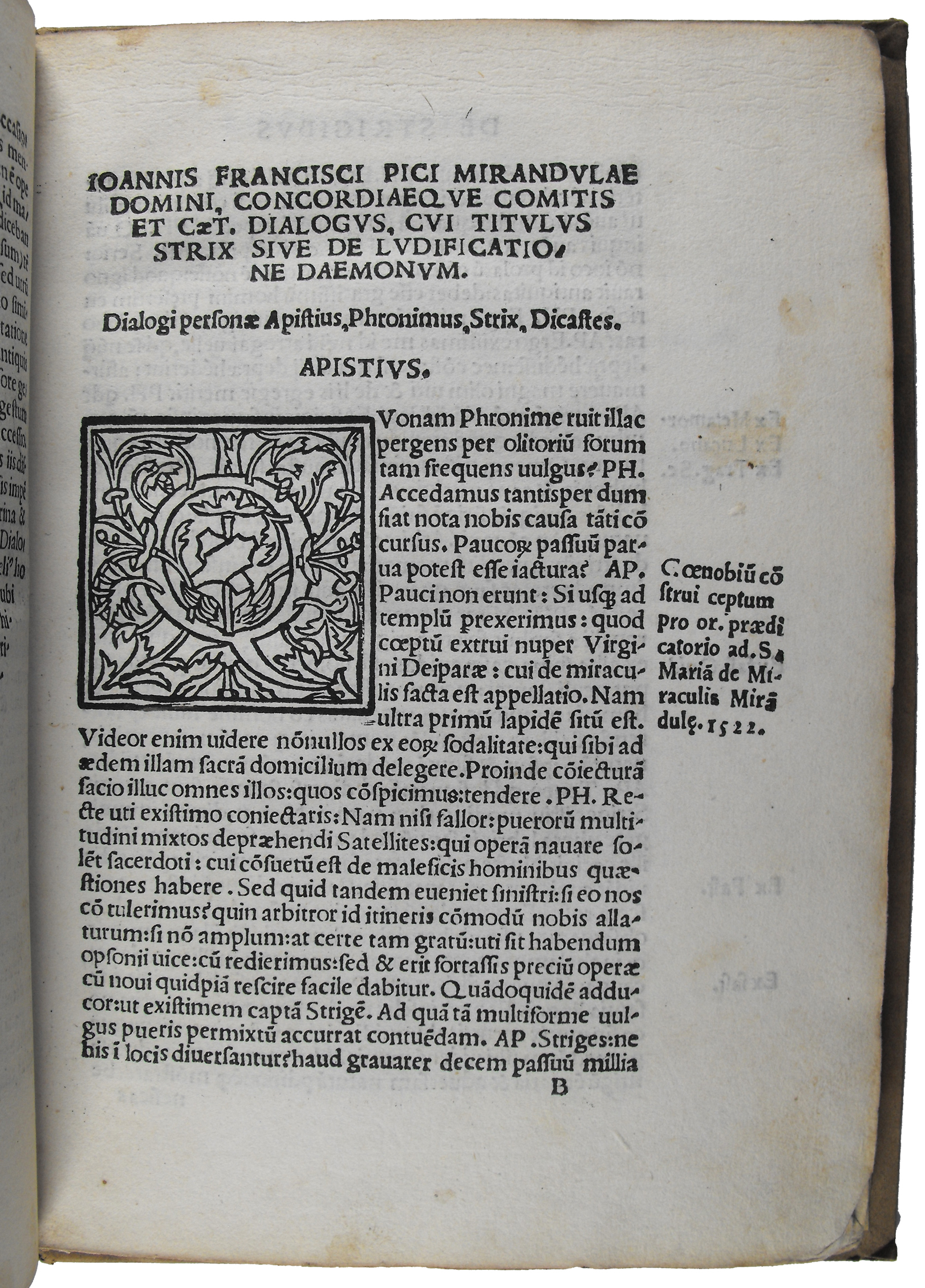 Giovanni Francesco Pico della Mirandola (1470-1533) Dialogus in tres libros divisus: titulus est Strix, Bononiae, a Hieronymo de Benedictis, 1523